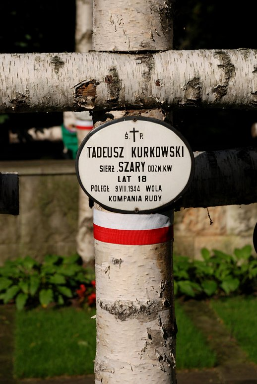 nad mogiłą Tadeusza Kurkowskiego na Powązkach wojskowych w Warszawie